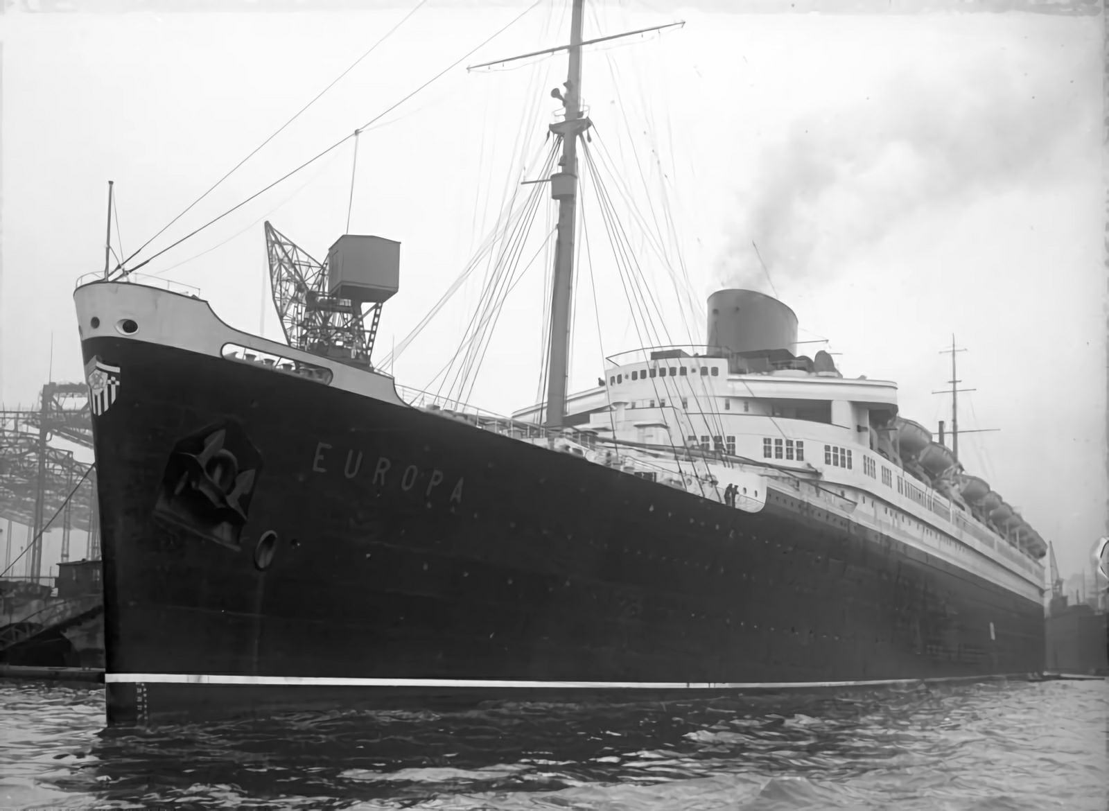 Die erste Probefahrt der "Europa", Deutschlands großtes Schiff verläßt Hamburg. Der deutsche Ozeanriese "Europa" unter Dampf, fertig zur ersten Probefahrt.